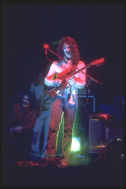 New Haven, CT